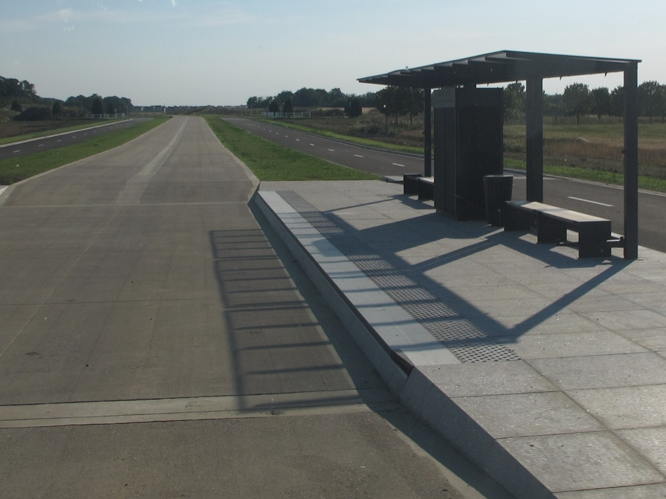 Parcours T-Zen ligne 1 - section en site propre au niveau de la future station Carré-Allée-Royale, en direction de la station Le-Fresne ; Lieusaint, Seine-et-Marne, France